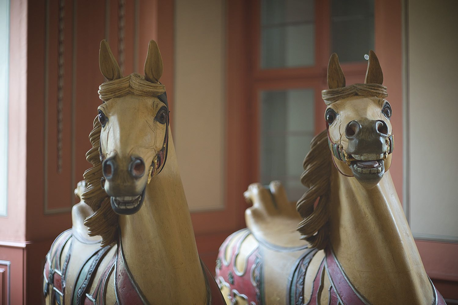 Zwei der bereits fertig restaurierten Pferde des Karussells in Wilhelmsbad. Ausgestellt im Kurhaus.